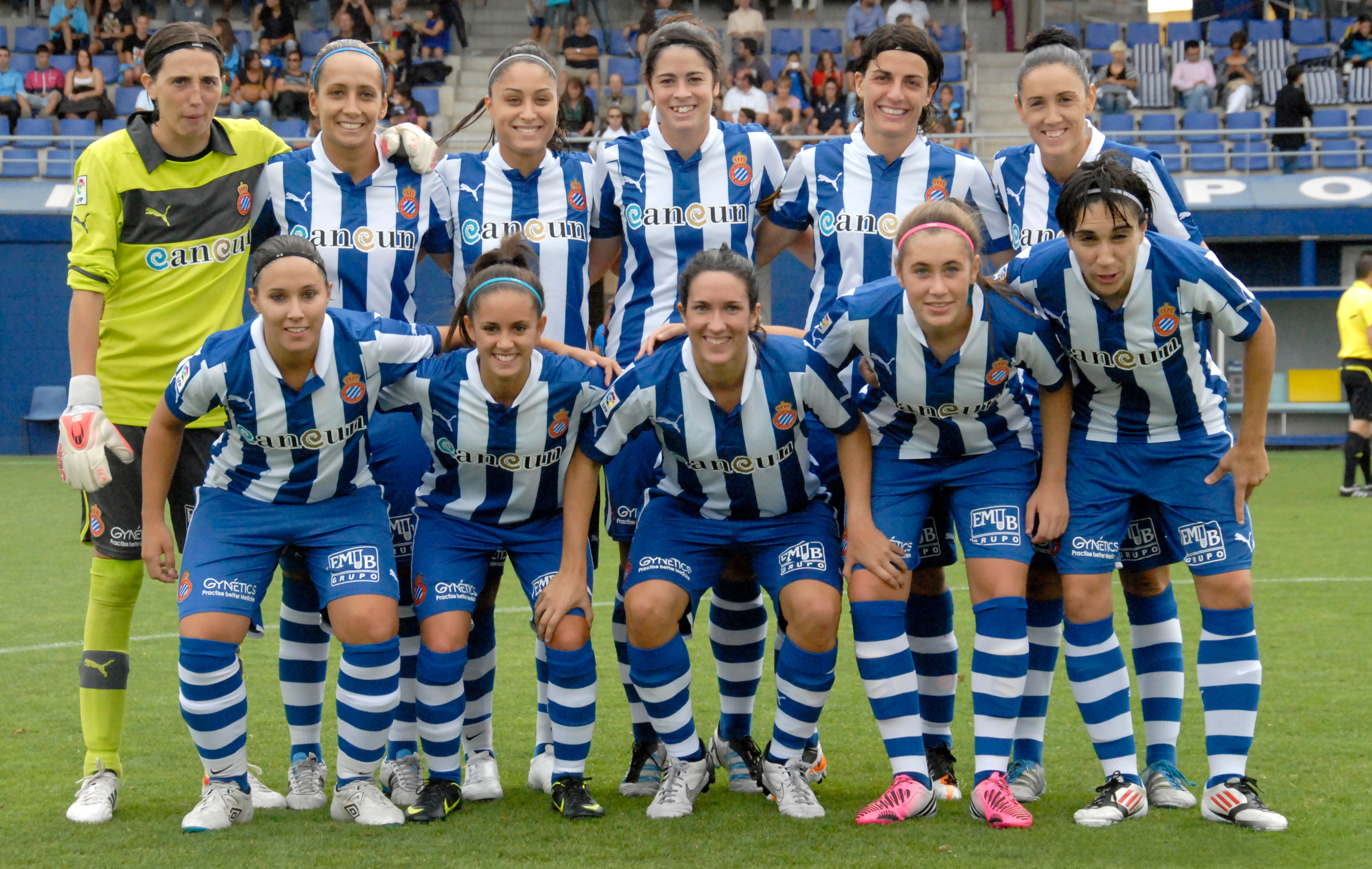 Equip femení del RCD Espanyol.Back row (L-R): María José Pons, Sónia Matias, Débora García, Marta Torrejón, Sandra Vilanova, Vanesa Gimbert; Front row (L-R): María Paz Vilas, Brenda Pérez Soler, Silvia Meseguer, Nuria Mendoza, Sara Monforte